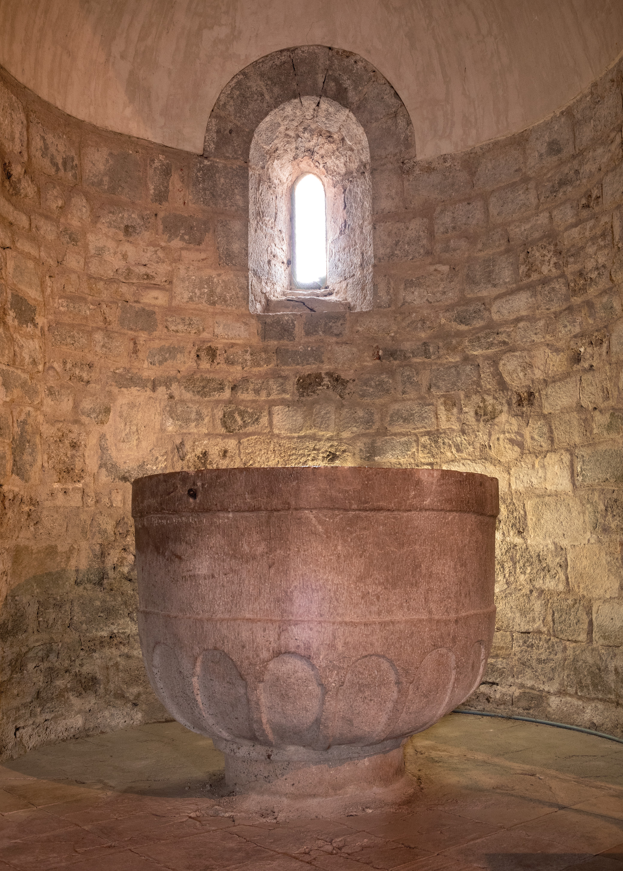 Santa Eulàlia Vilanova de la Muga Pica Baptismal